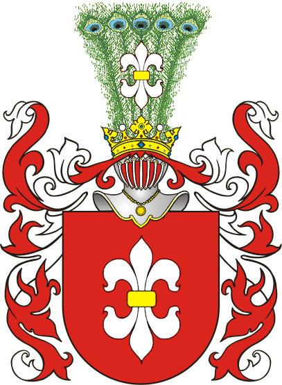 Clan Gozdawa